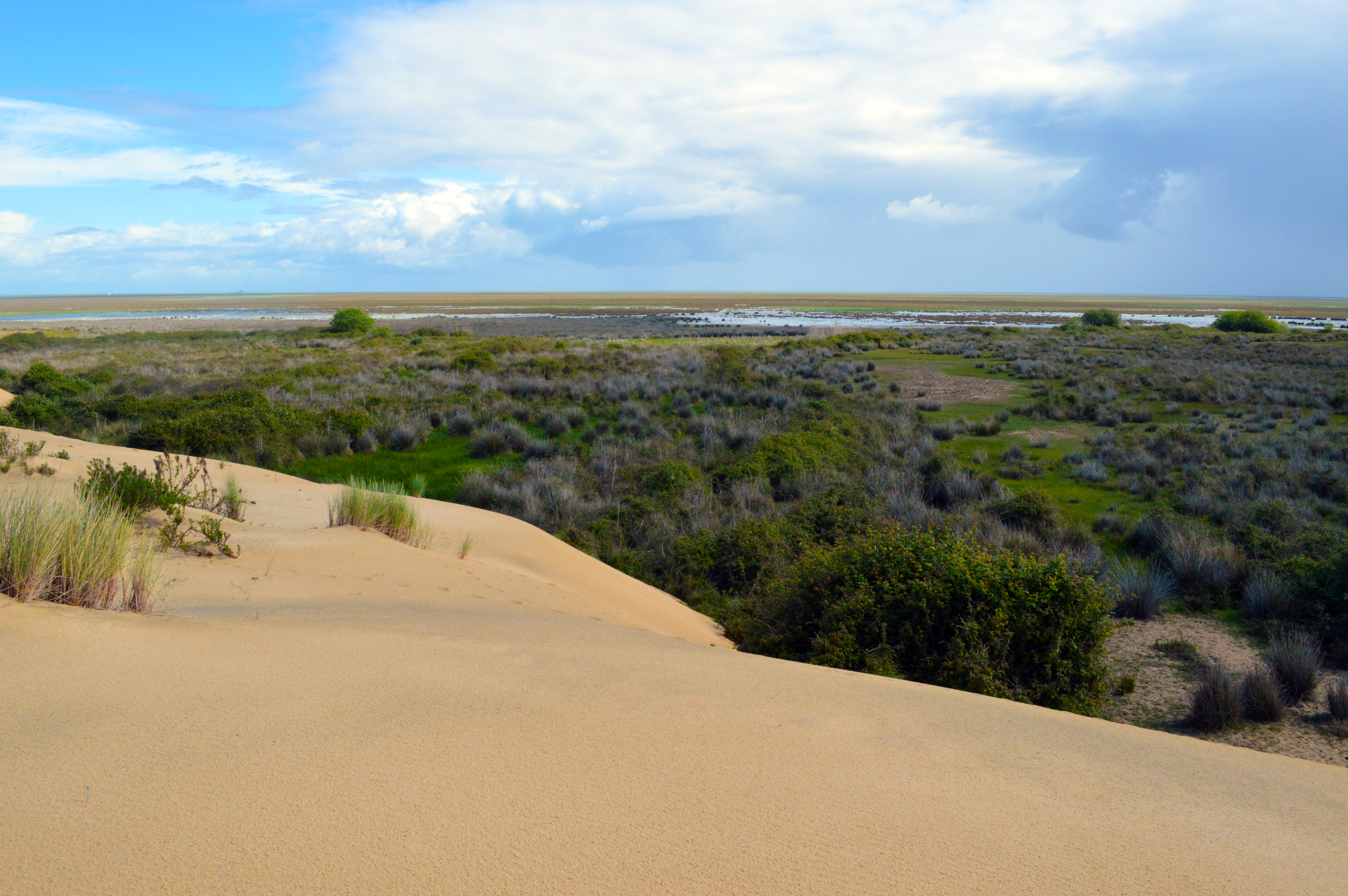 Parque nacional y natural de Doñana This is a photography of a Site of Community Importance in Spain with the ID: ES0000024. Natura2000 entry, EEA entry